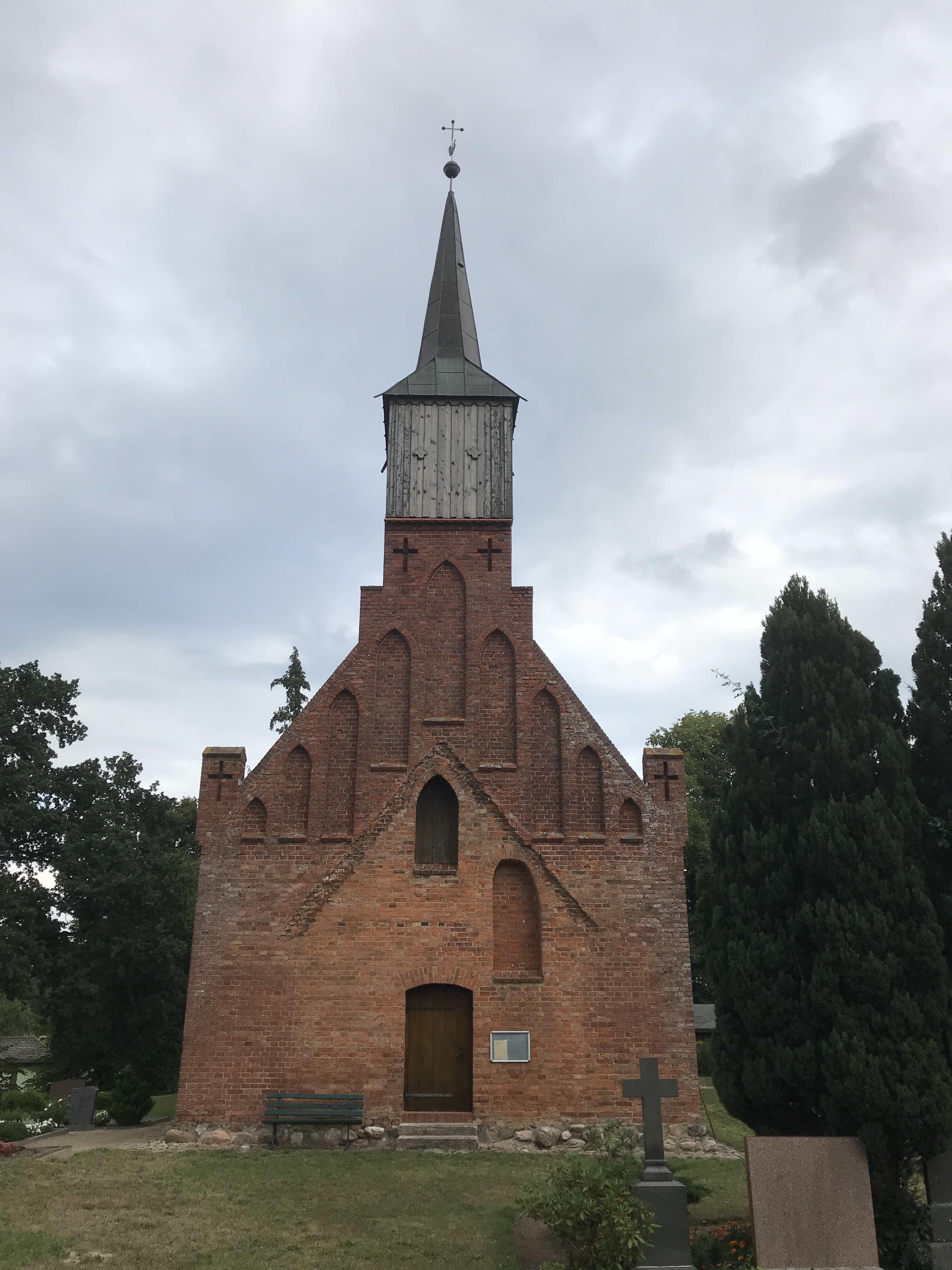 Die Dorfkirche in Kuhlrade der Stadt Marlow entstand im 18. Jahrhundert. Im Innern befindet sich eine bauzeitliche und schlichte Kirchenausstattung.